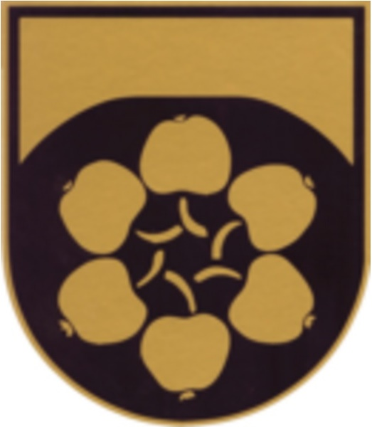 Das Wappen zeigt den Hausberg im Hintergrund und sechs Äpfel, welche die Katastralgemeinden symbolisieren, im Vordergrund.